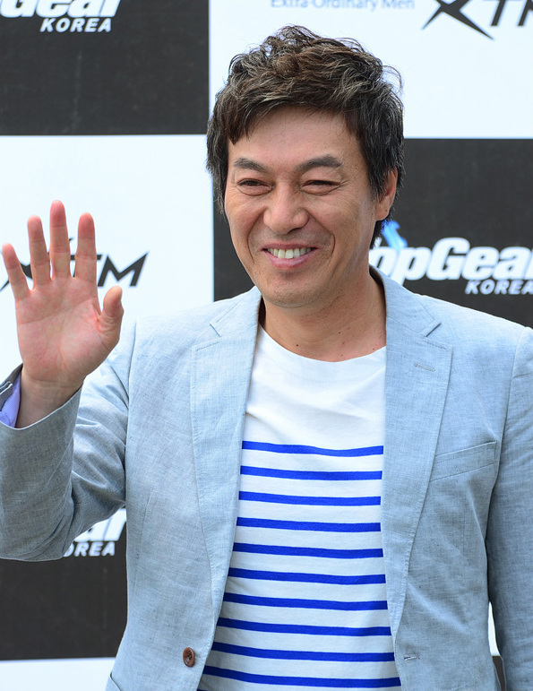 탑 기어 코리아